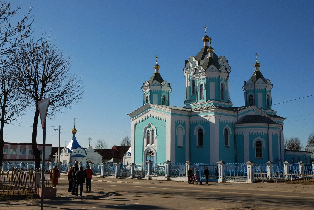 Хоцімск. Свята-Троіцкая царква